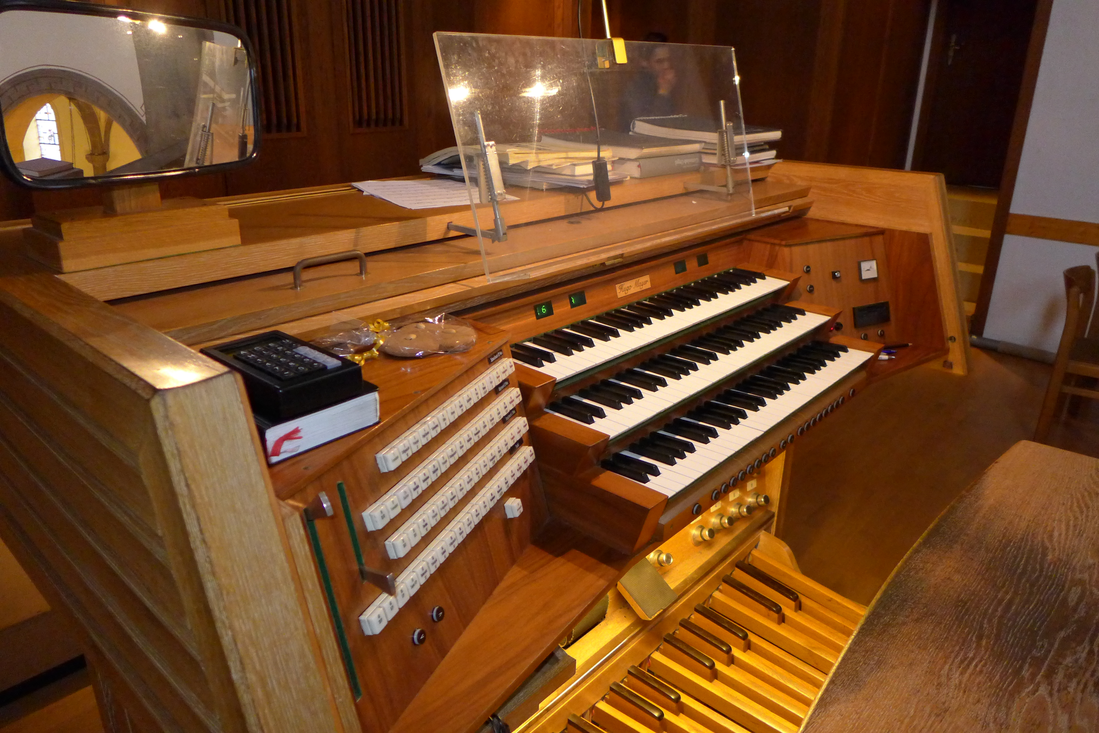 Spieltisch der Gürzenich-Orgel im Saardom